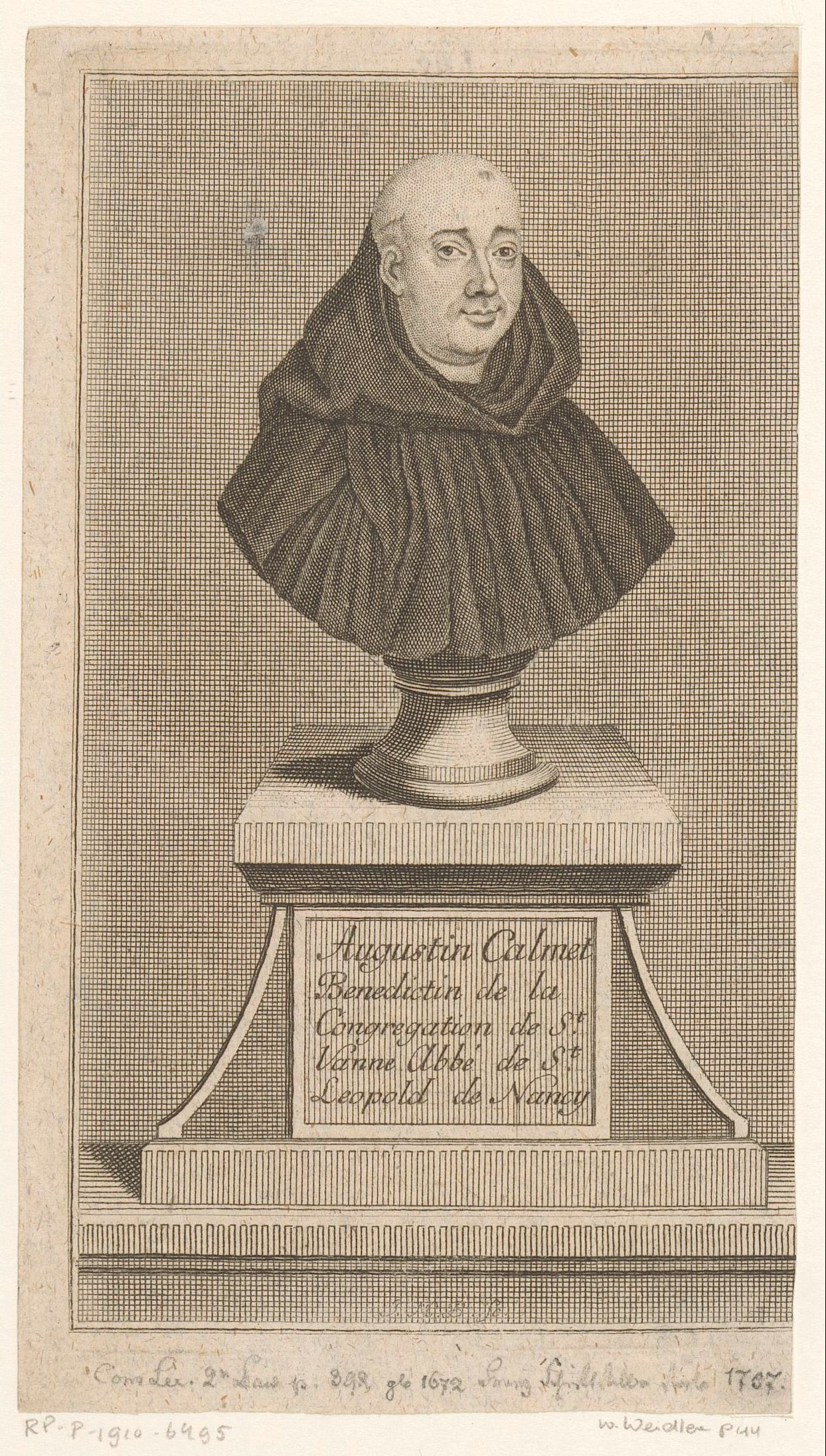 IdentificatieTitel(s): Portret van Augustin CalmetObjecttype: prent Objectnummer: RP-P-1910-6495Catalogusreferentie: HAB A 3306Opschriften / Merken: verzamelaarsmerk, verso, gestempeld: Lugt 2228VervaardigingVervaardiger: prentmaker: Johann Martin BernigerothPlaats vervaardiging: LeipzigDatering: 1742Fysieke kenmerken: gravure met stippelwerkMateriaal: papier Techniek: graveren (drukprocedé) / stippelwerkAfmetingen: blad: h 165 mm × b 92 mm (binnen de plaatrand afgesneden)ToelichtingPrent ook gebruikt in: Zuverlässige Nachrichten von dem gegenwärtigen Zustande, Veränderung und Wachsthum der Wissenschaften. dl. 25. Leipzig: Johann Friedrich Gleditsch, 1742.OnderwerpWat: historical personsWie: Augustin CalmetVerwerving en rechtenVerwerving: aankoop 1905Copyright: Publiek domein